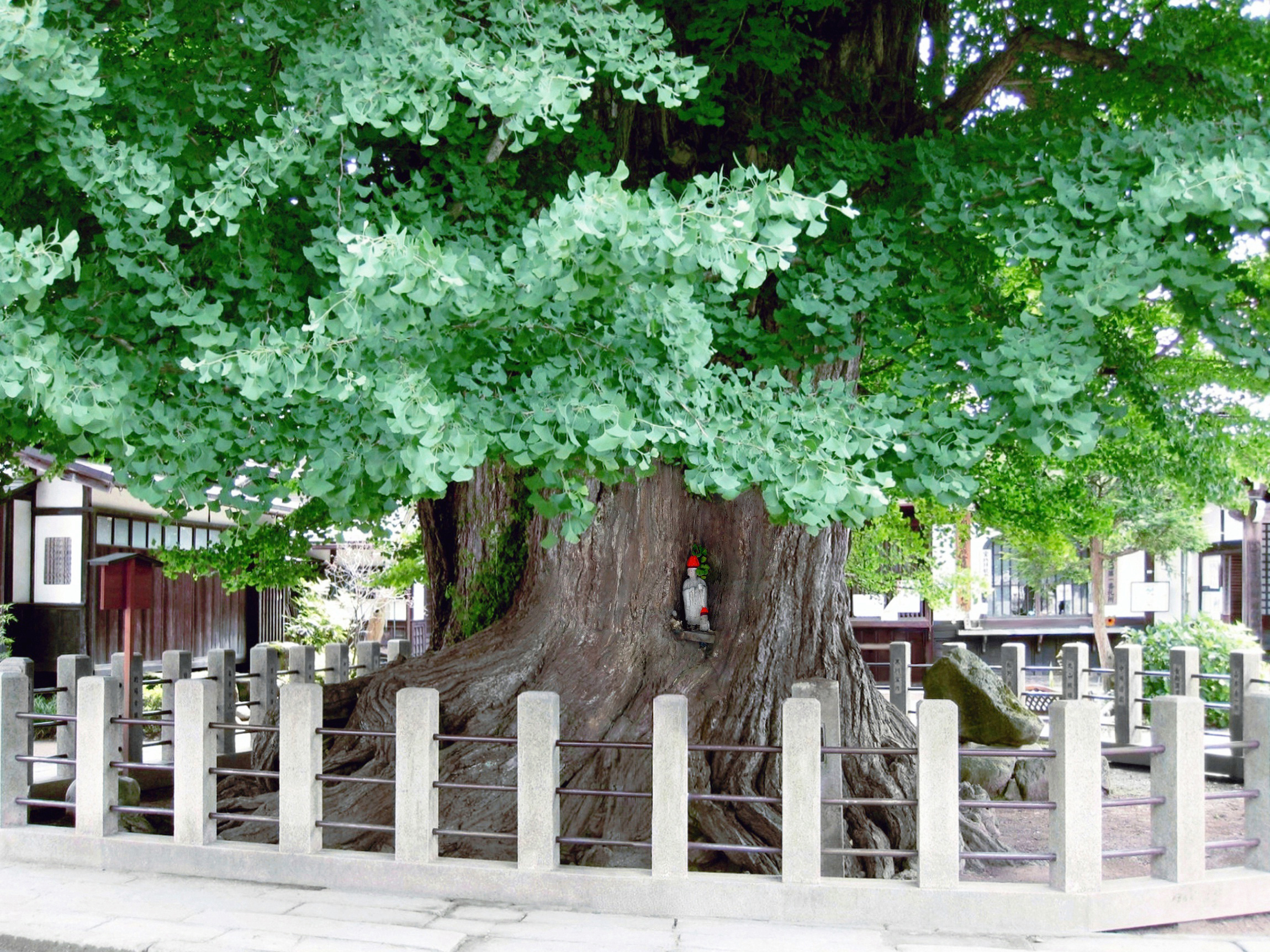 Ginkgobaum am Hida Kokubunji Takayama-shi, Präfektur Gifu, Japan